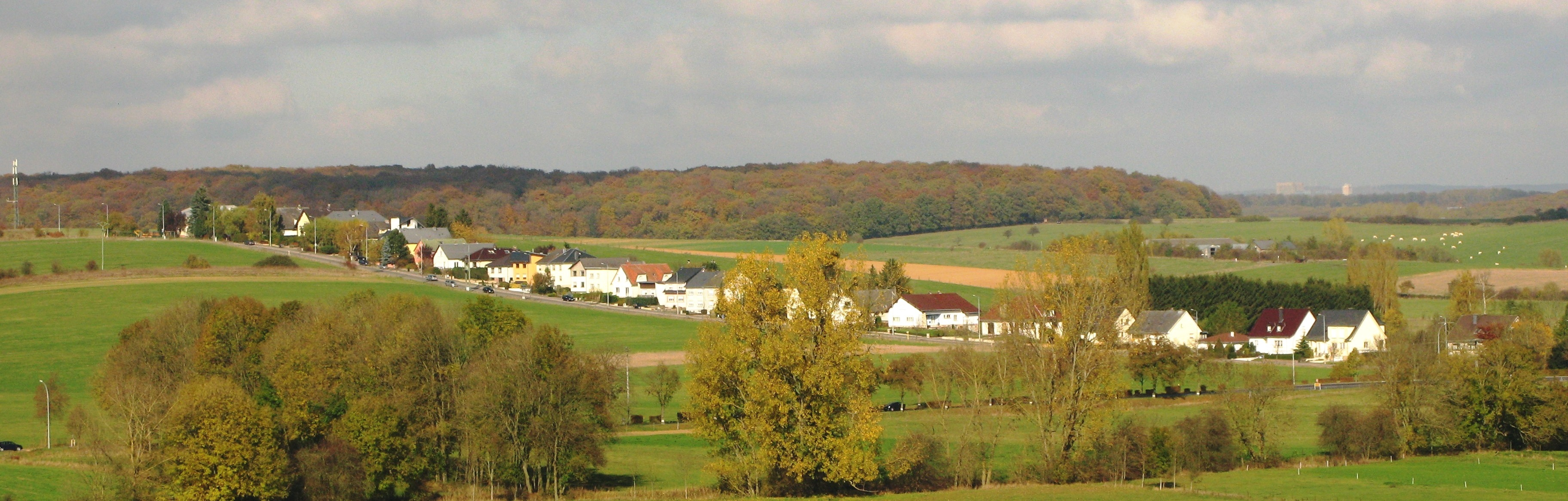 Obelerbierg vum Äppelbierg aus gesinn. Obelerbierg Obelerbierg